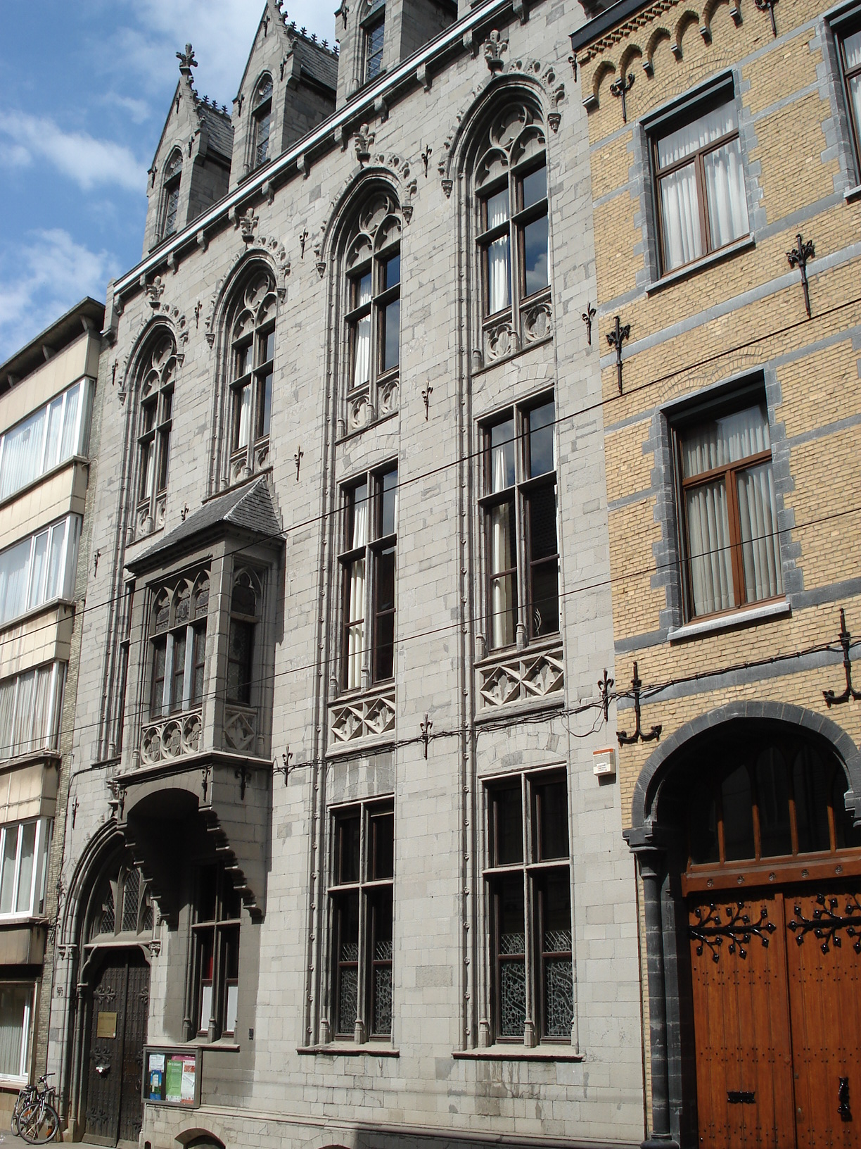 Anvers, Belgique, quartier dit 'Klein-Antwerpen'. Maison néo-gothique Cuypers, Lange Leemstraat (rue Longue d'Argile).